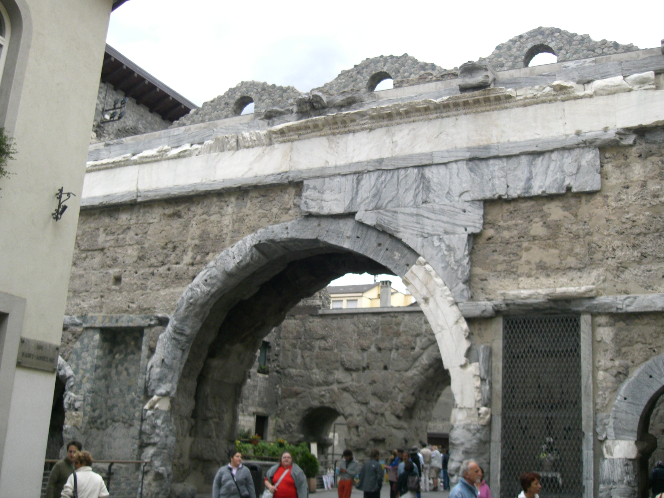 Facciata esterna di Porta Praetoria ad Aosta